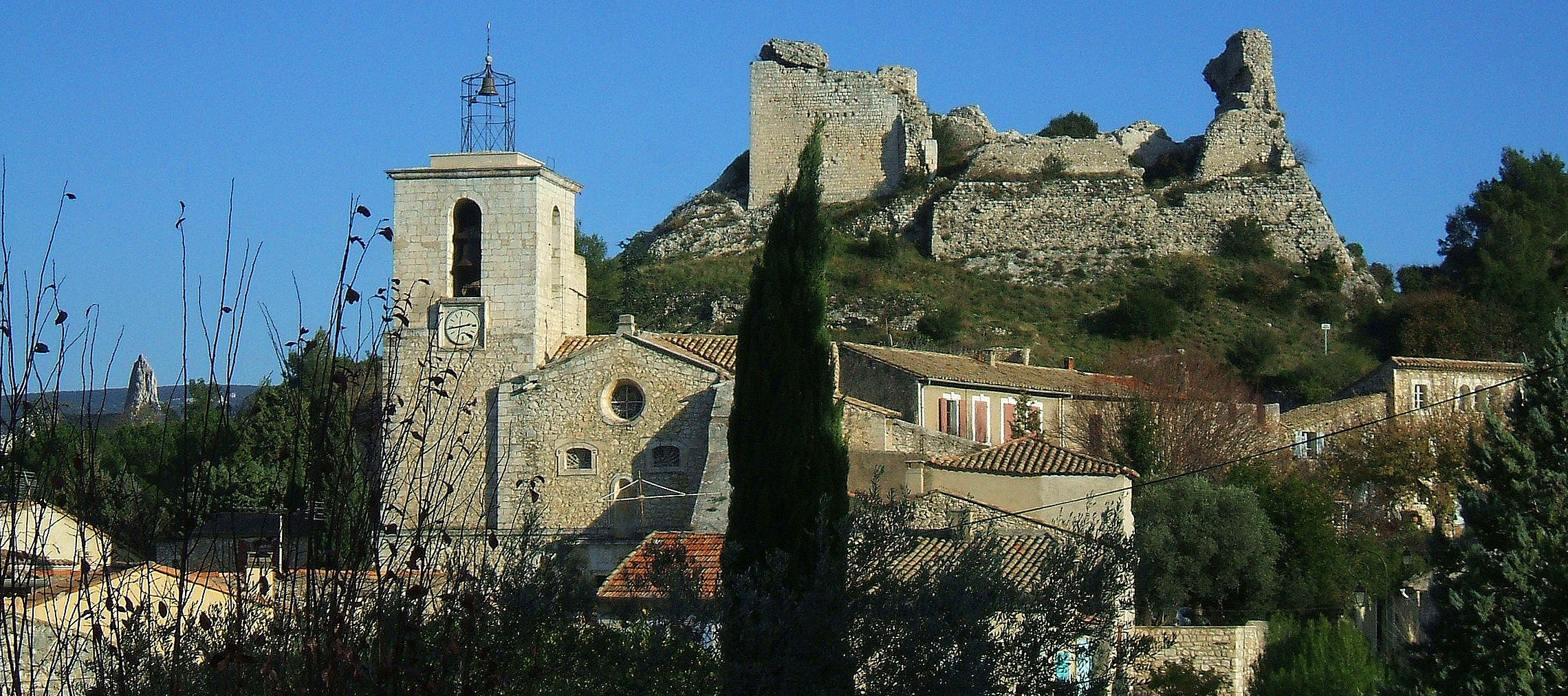 Orgon (Bouches-du-Rhône, France) - Vue générale avec l'église et les ruines du Château du duc de Guise (10.12.2006) L'église Notre-Dame de l'Assomption date du XIVème siècle.